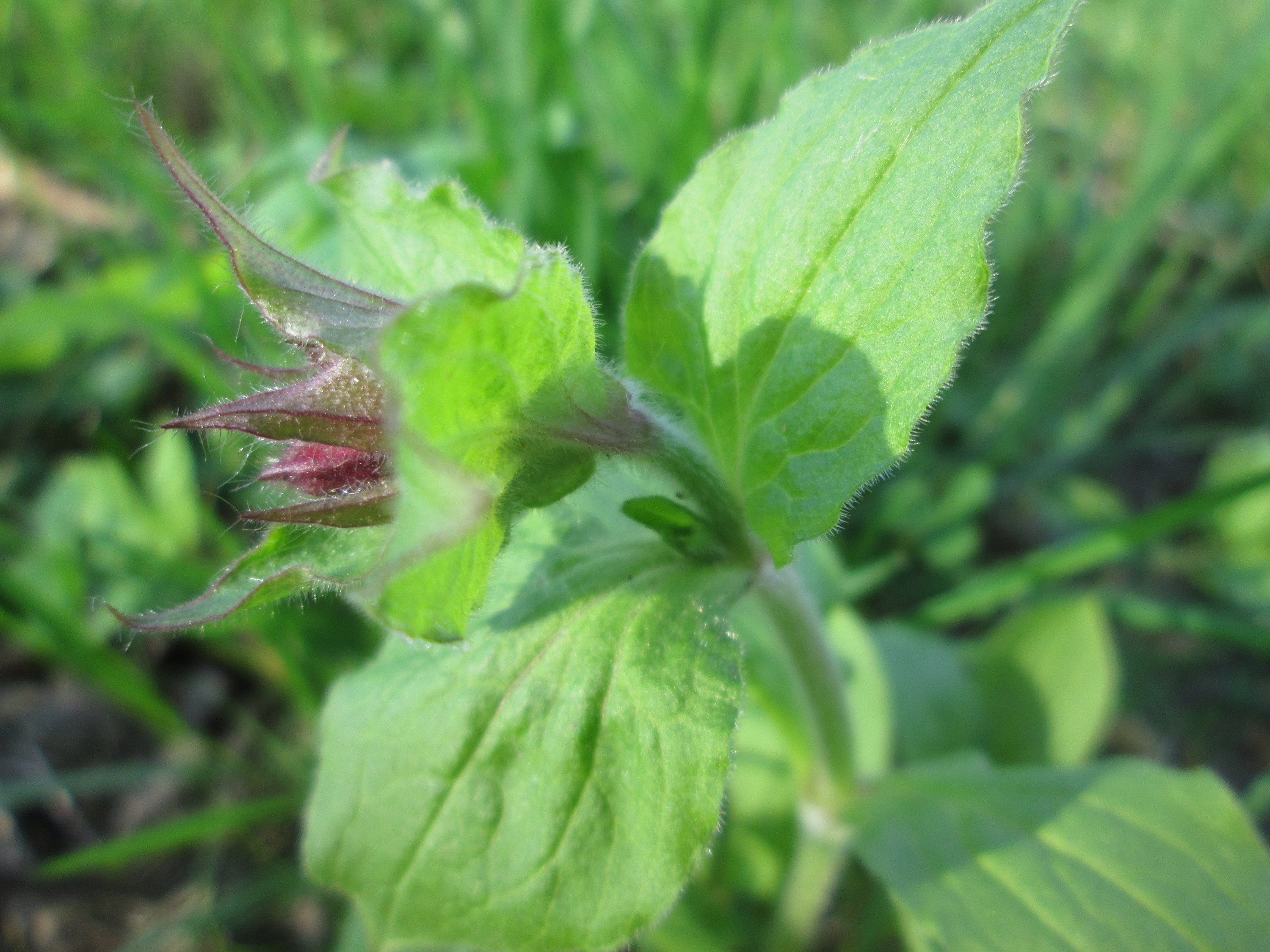 Rote Lichtnelke (Silene dioica) an der Saar in Alt-Saarbrücken